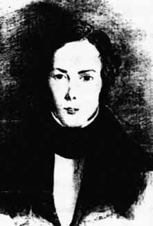 Retrat del matemàtic irlandès John Thomas Graves (1806-1870)